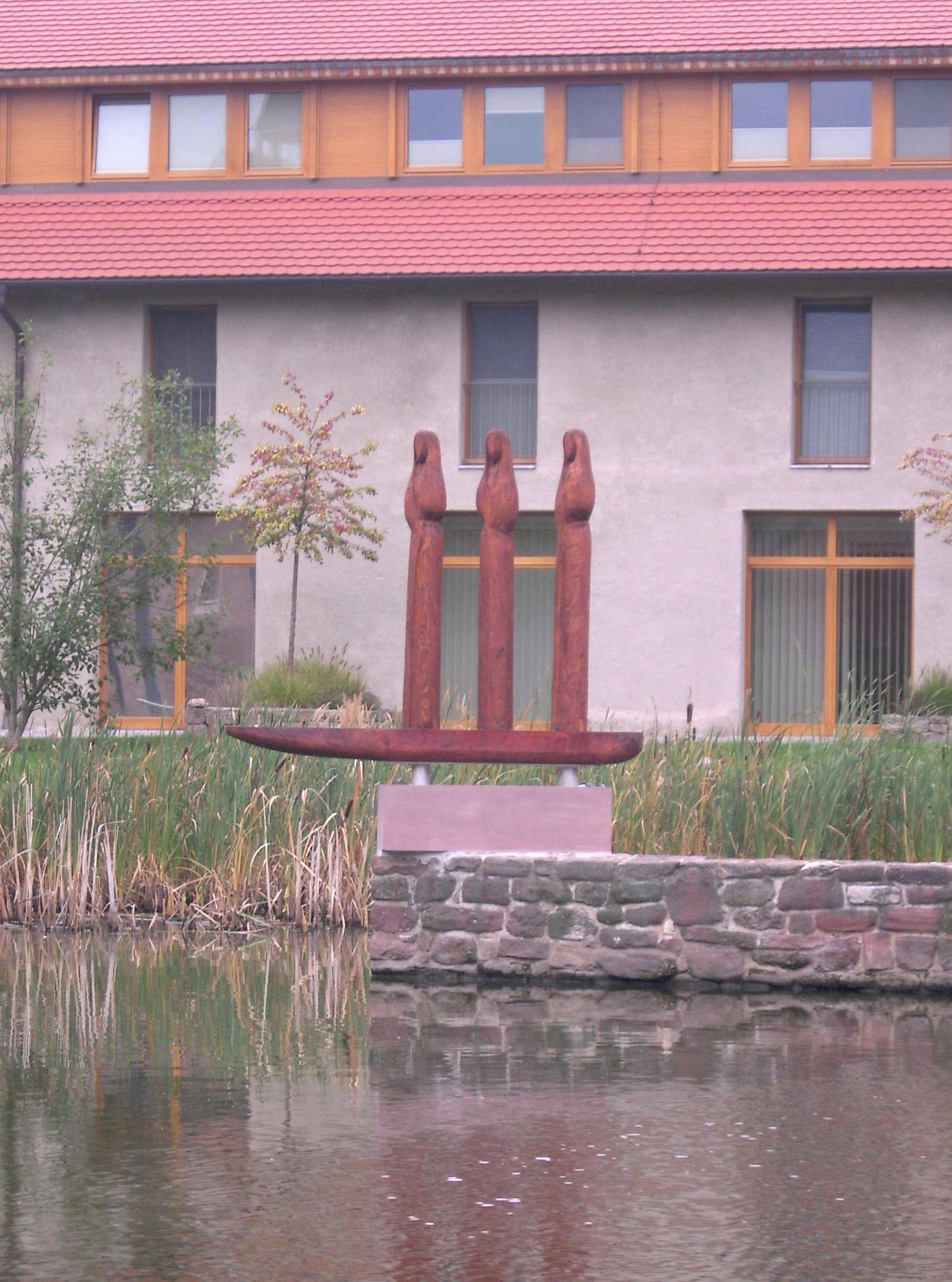 Kloster St. Marien zu Helfta, Darstellung der drei Mystikerinnen und Bildungs- und Exerzitienhaus